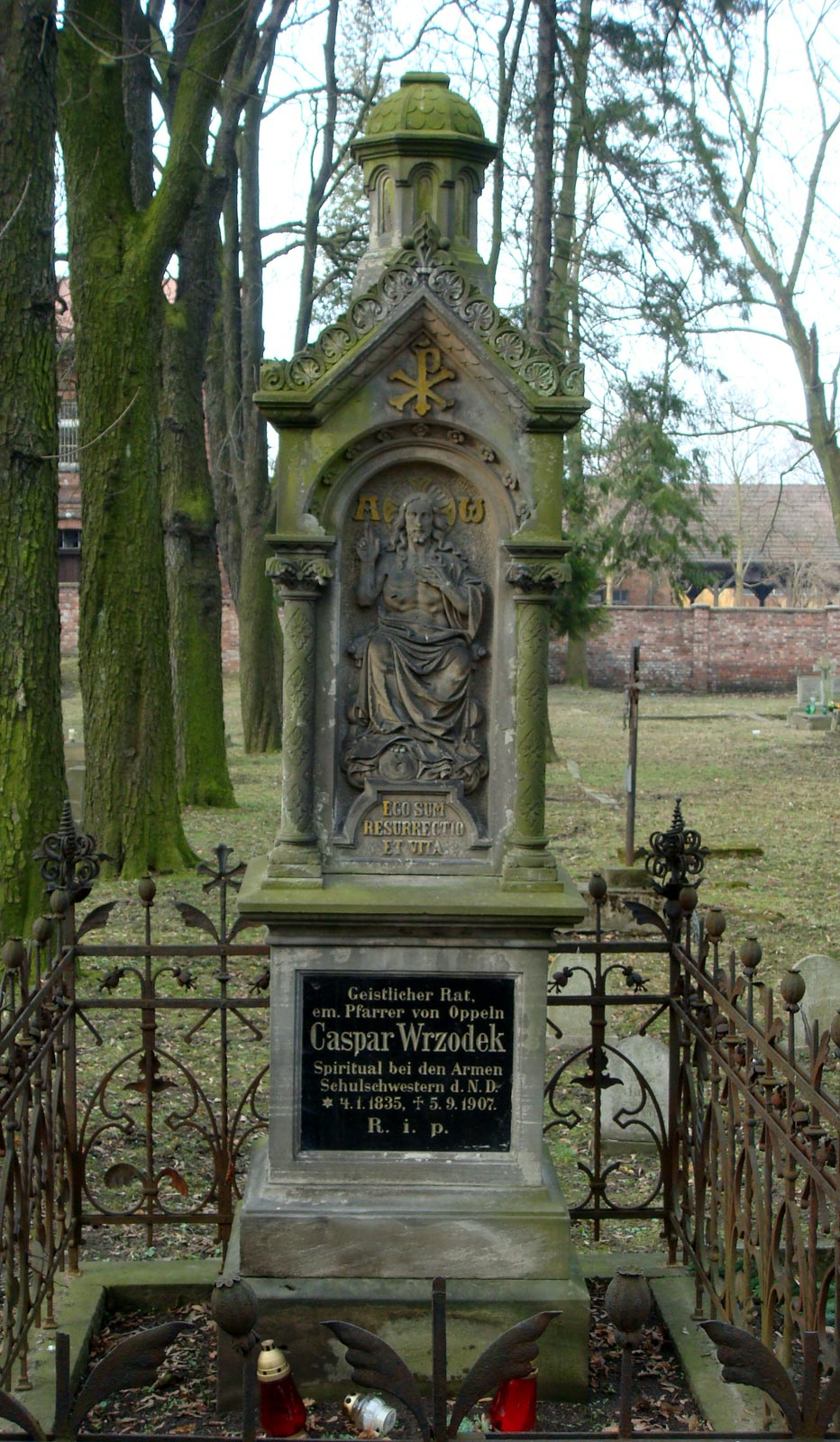 Nagrobek Caspara Wrzodeka na cmentarzu ewangelicko-augsburskim przy ul. Wrocławskiej w Opolu.